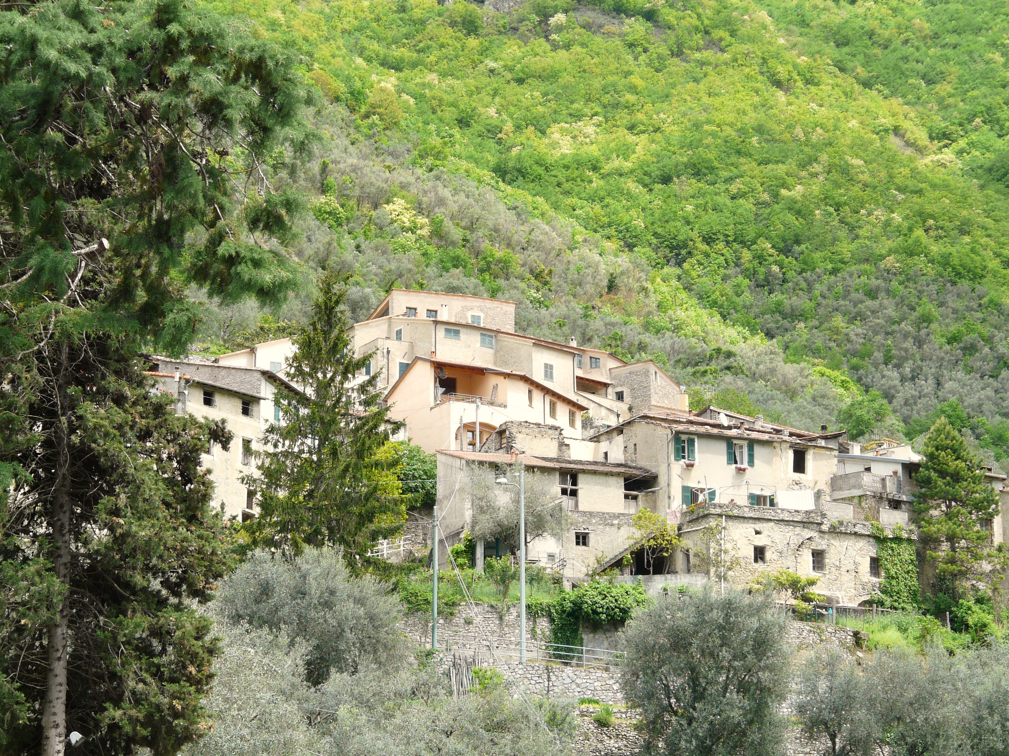 Nasino, Liguria, Italia